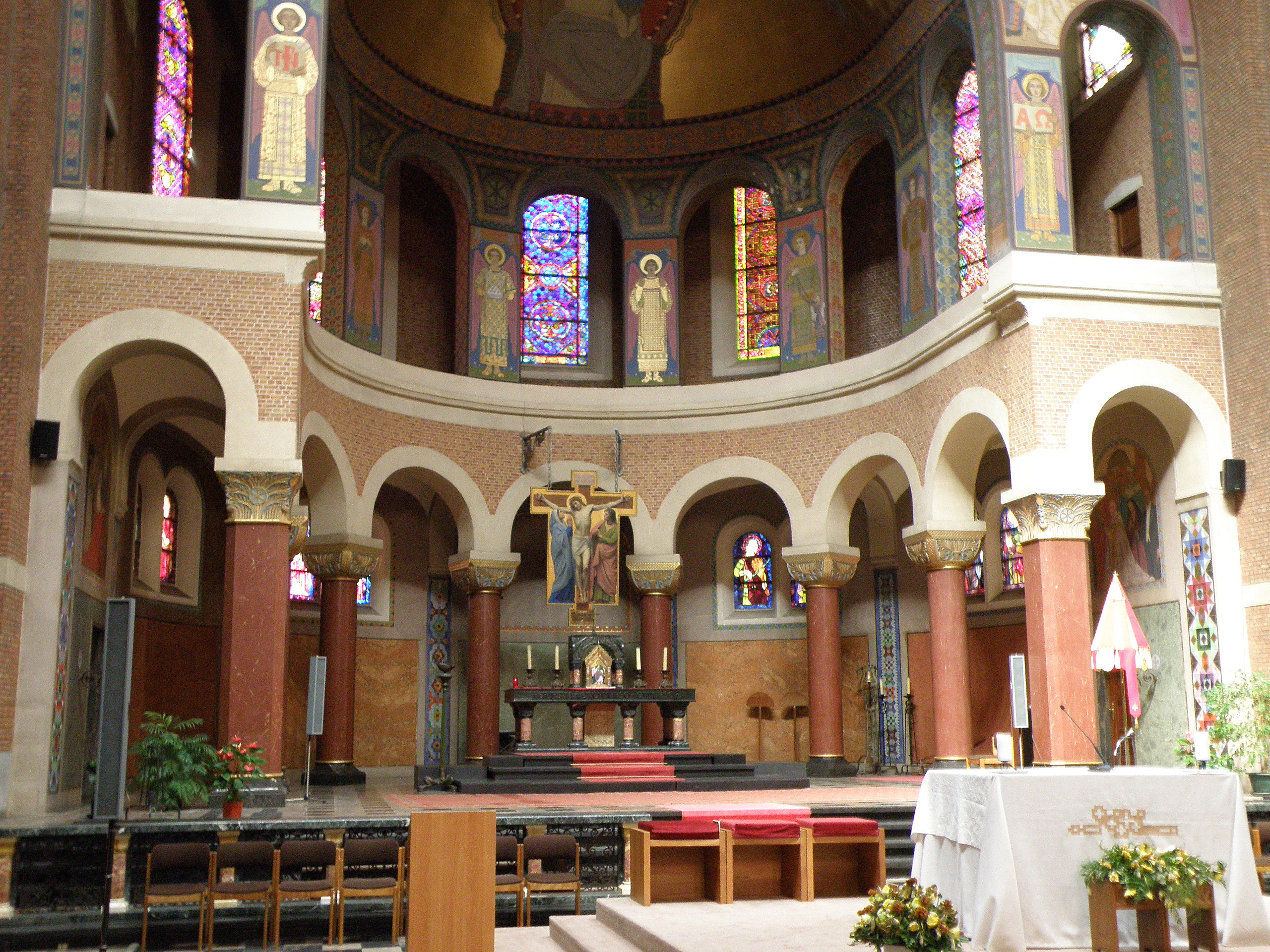 Edegem (bij Antwerpen). Parochiekerk Onze-Lieve-Vrouw-van-Lourdes.